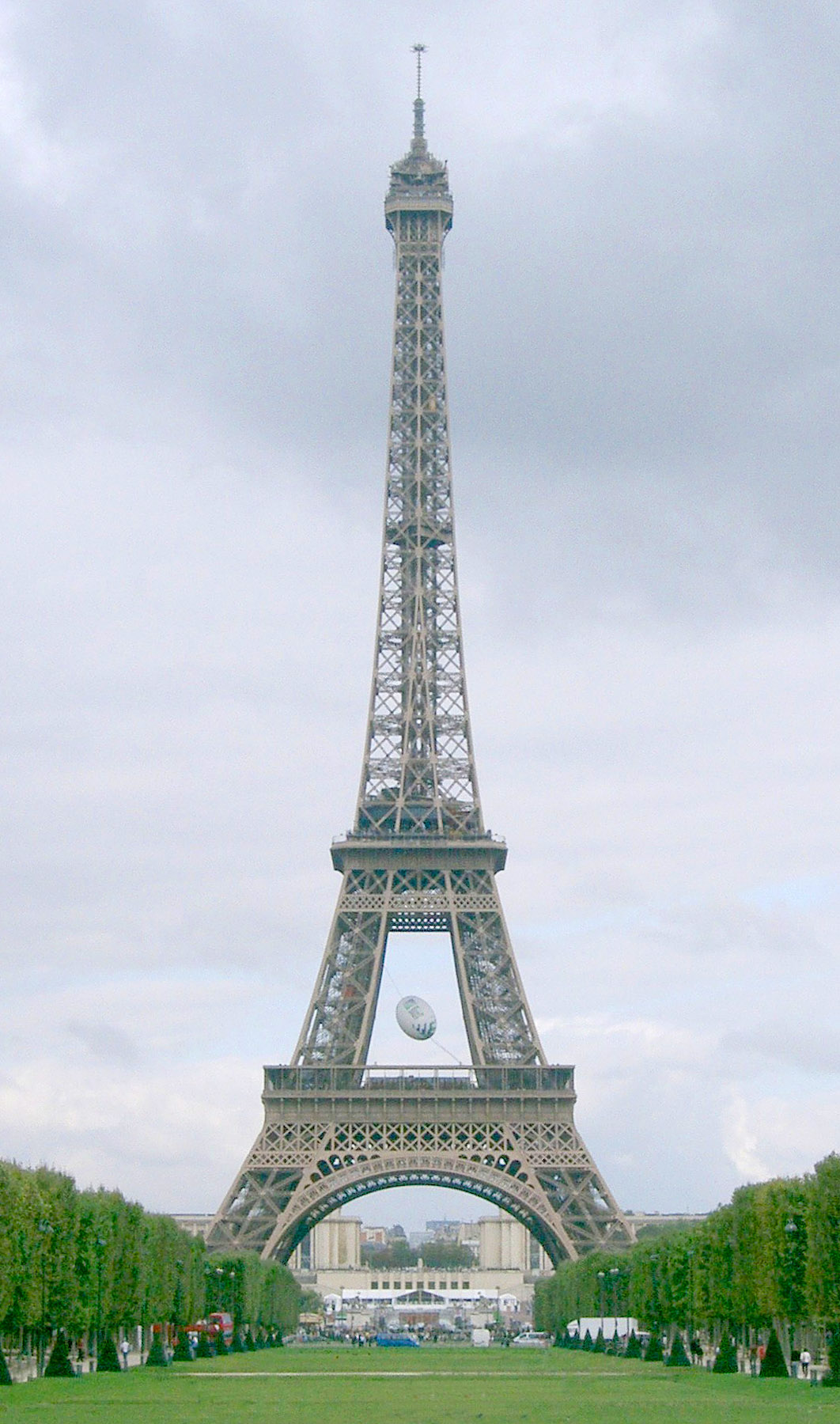 Information Ballon de rugby sous la Tour Eiffel à l'occasion de la coupe du monde de rugby 2007 en France